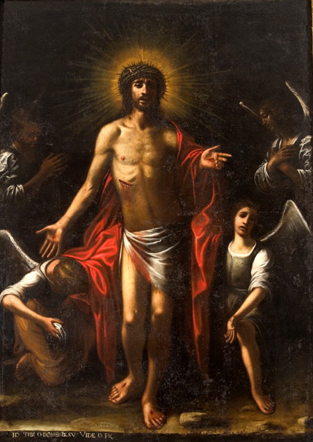 Stigmates par Mario Minniti Sicile)